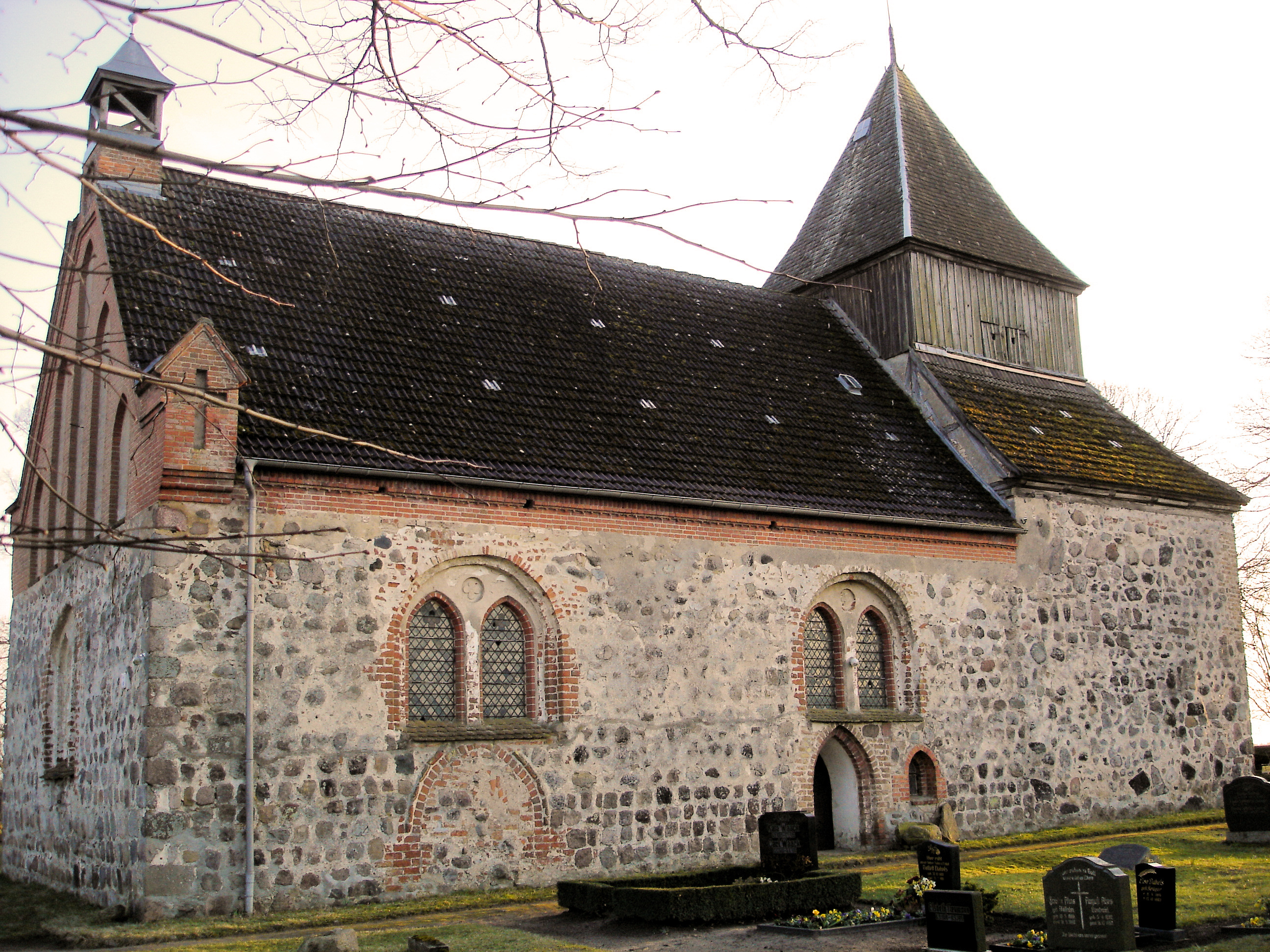 Kirche Dänschenburg / Church in Dänschenburg